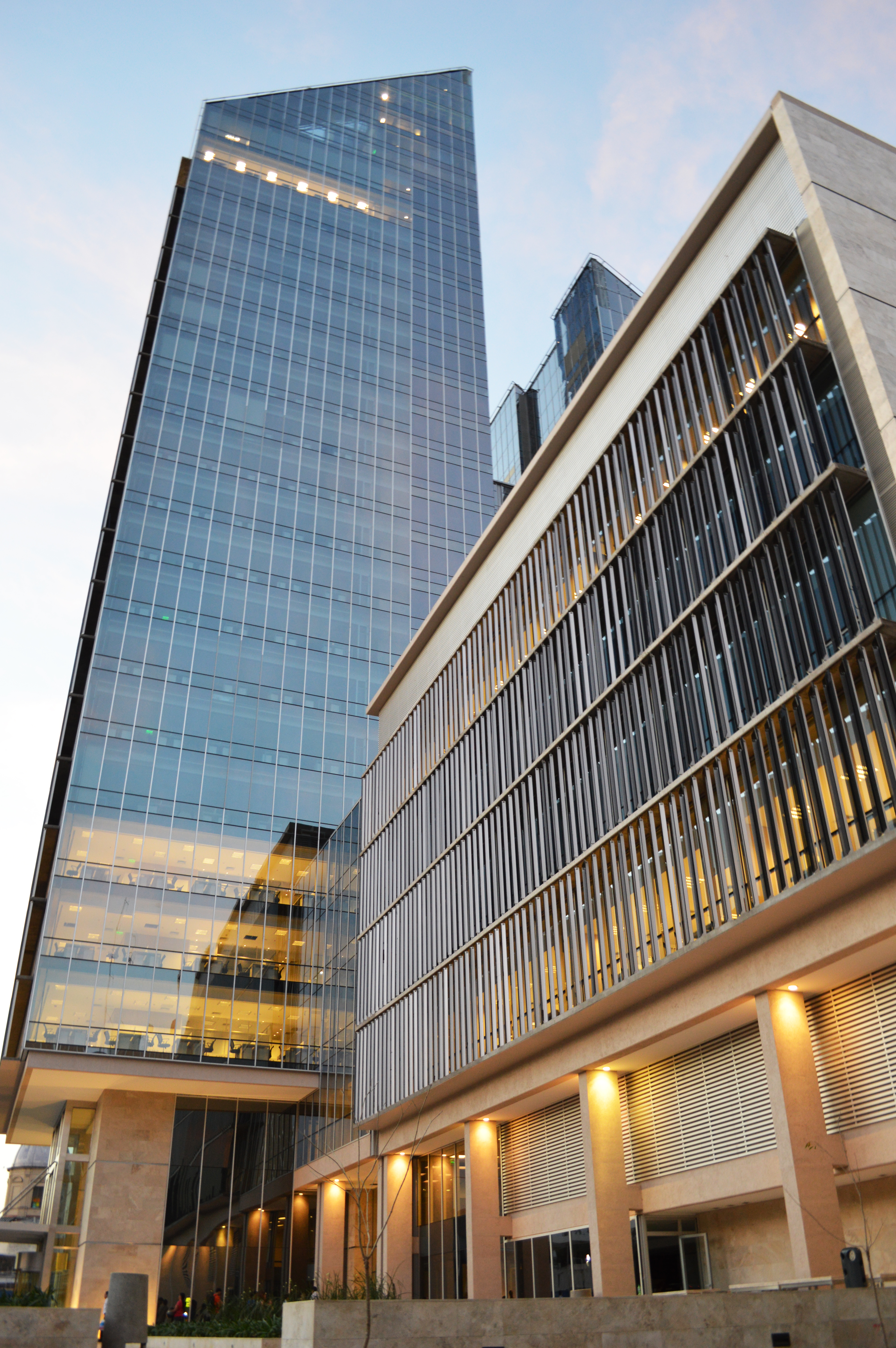 Edificio de la Caja Social y del Ministerio de Economía. Esta última, es la torre de mayor altura del Complejo Juan Felipe Ibarra, de la ciudad de Santiago del Estero, Argentina.